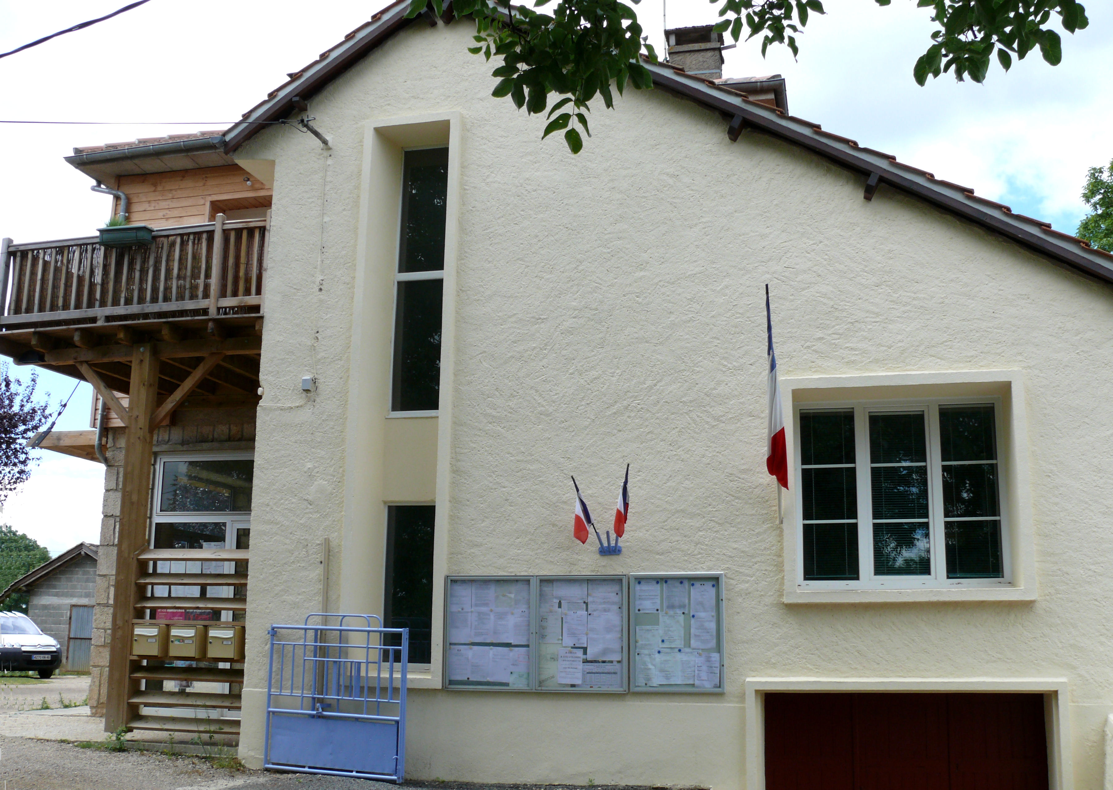 Albiac - Mairie